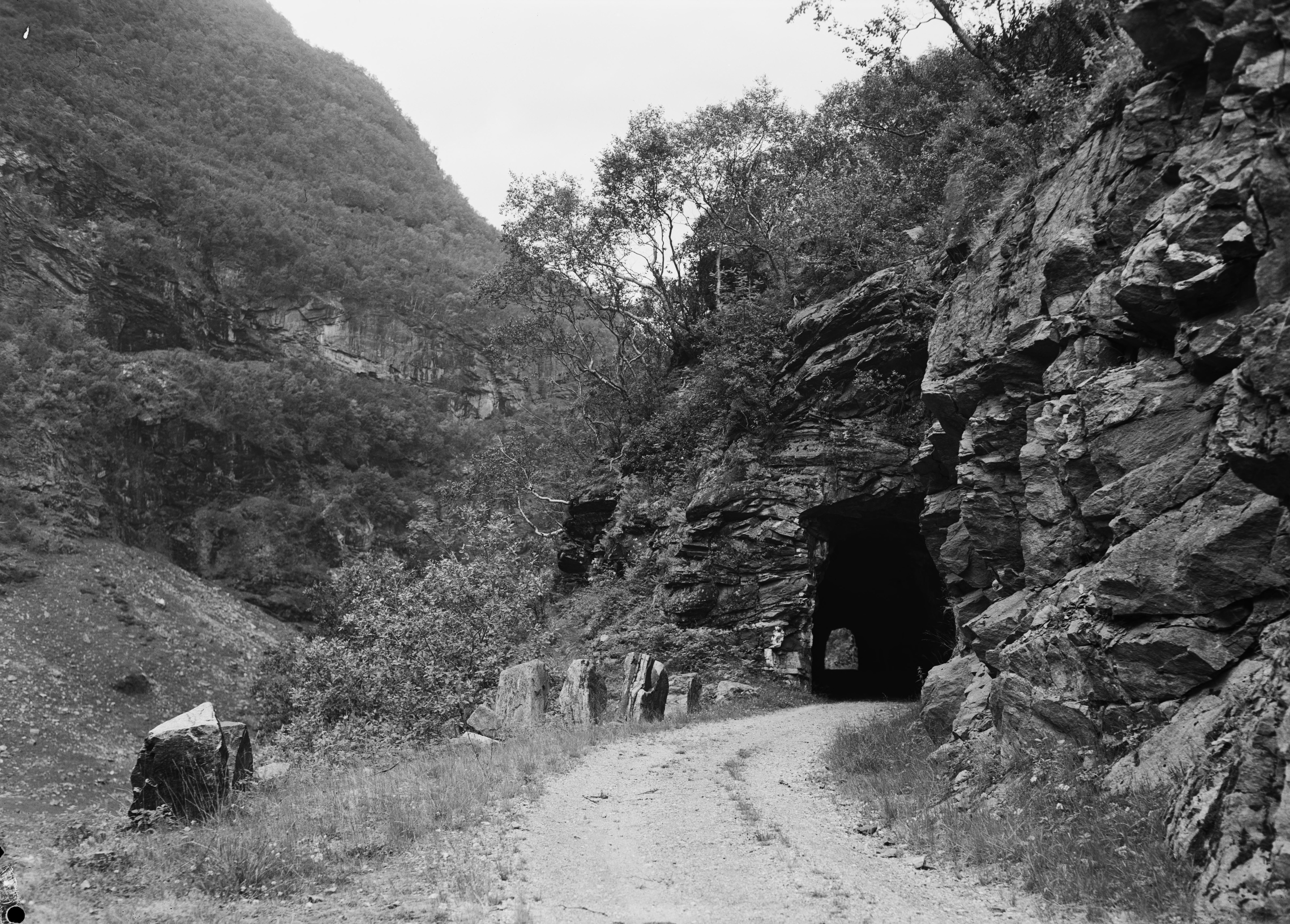 Bildet er hentet fra Nasjonalbibliotekets bildesamling. Anmerkninger til bildet var: Fotograf ukjent. Flåmsdalen, Aurland, Sogn og Fjordane